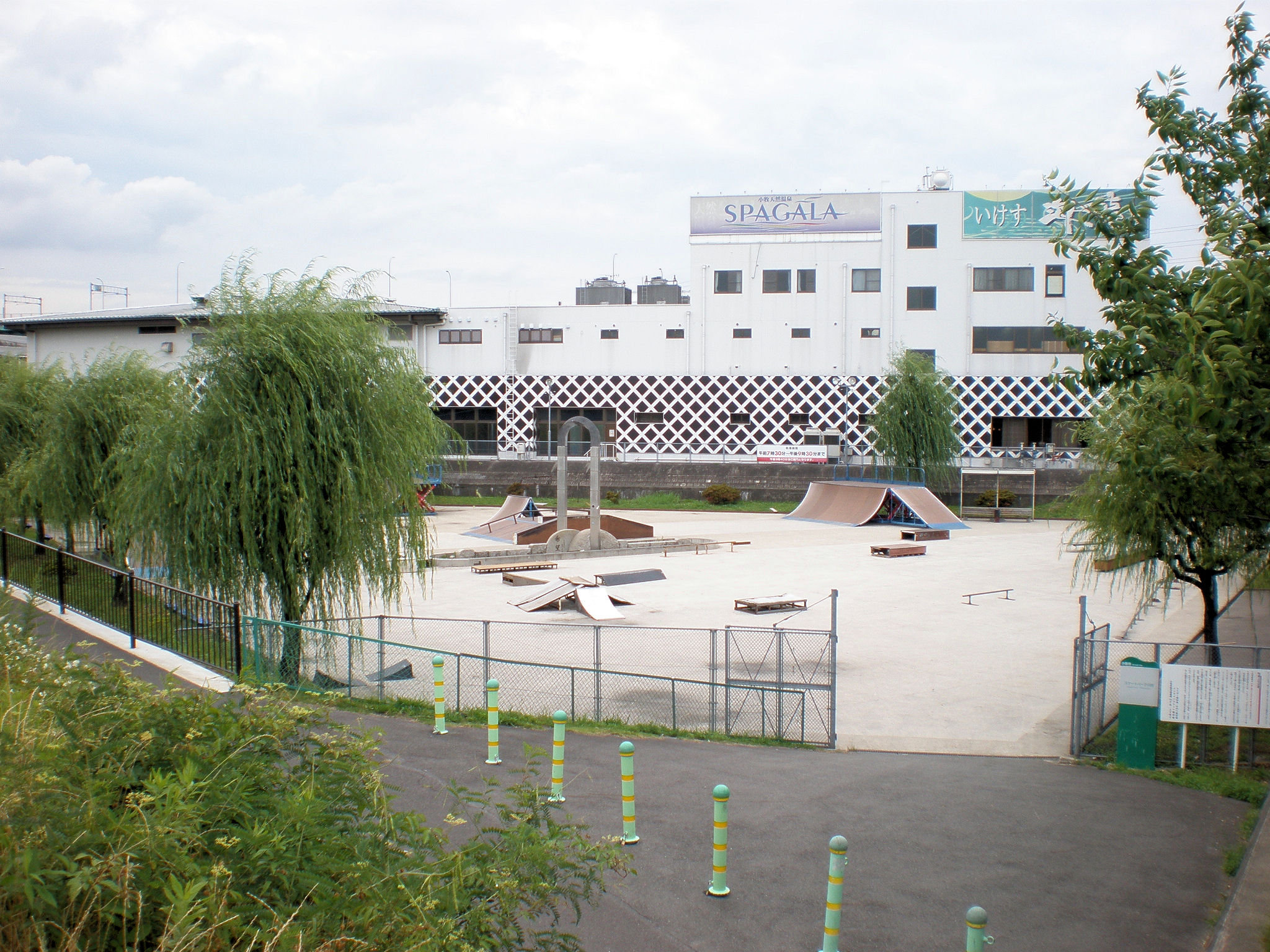 愛知県小牧市にあるスケートパーク川西